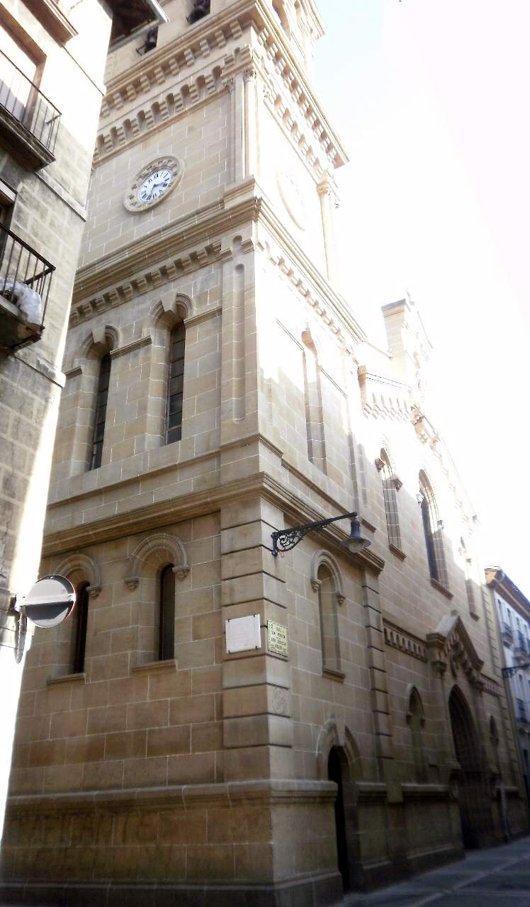 Iglesia de San Agustín (Pamplona)